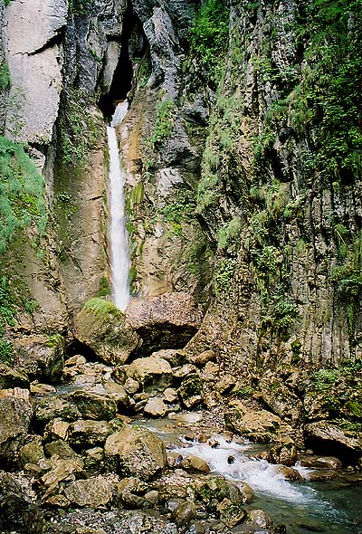 Grandvillard: Wasserfall der Tâna